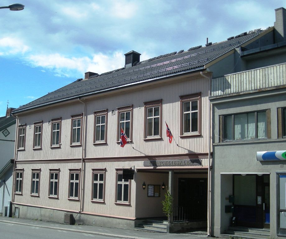 Evangeliesalen Lillehammer